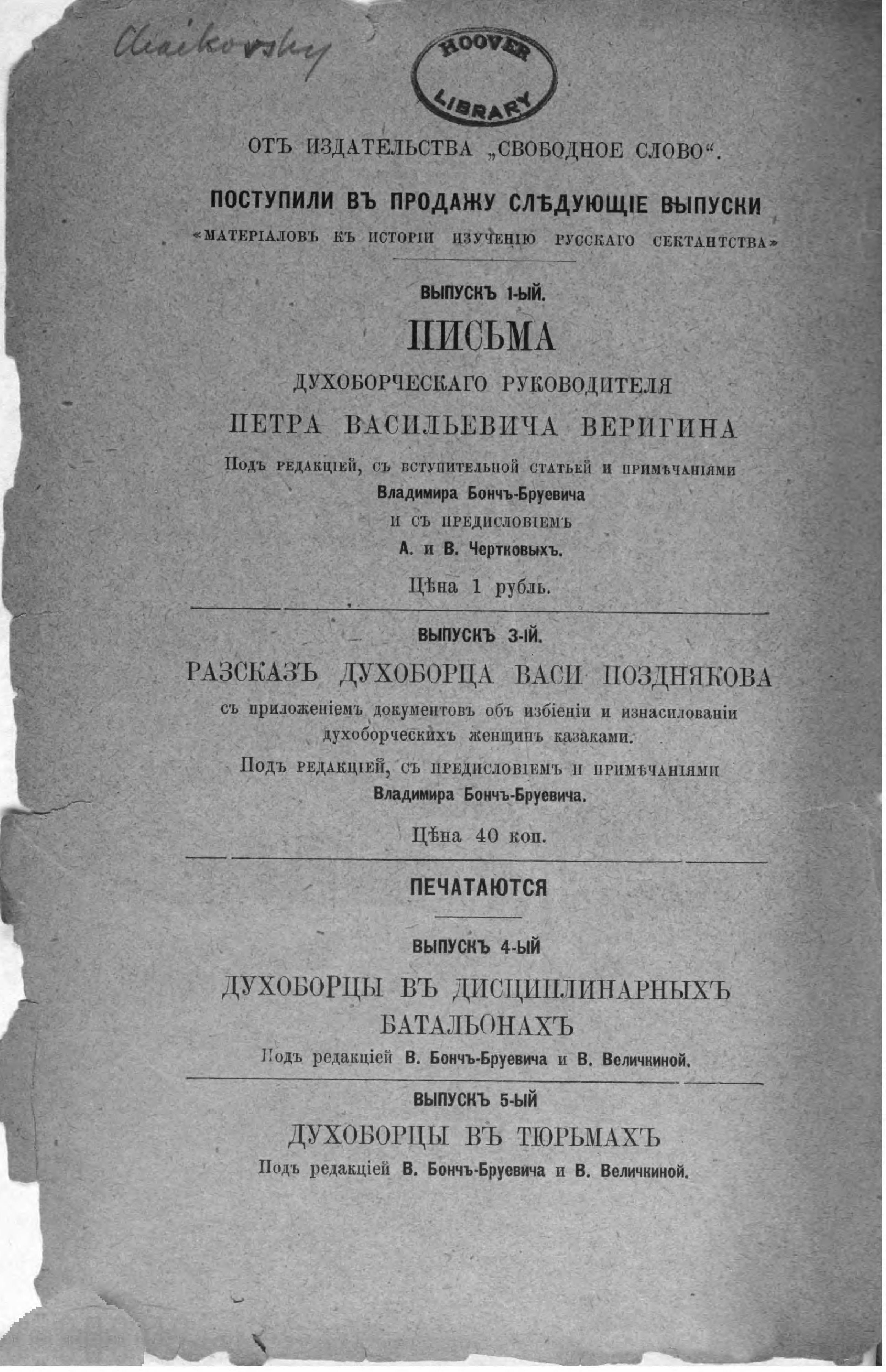 Анонс брошюр с материалами о репрессиях против духоборов из брошюры Бонч-Бруевич В. Материалы к изучению русского сектантства и раскола. Разьяснение жизни христиан. Выпуск 2. 1901